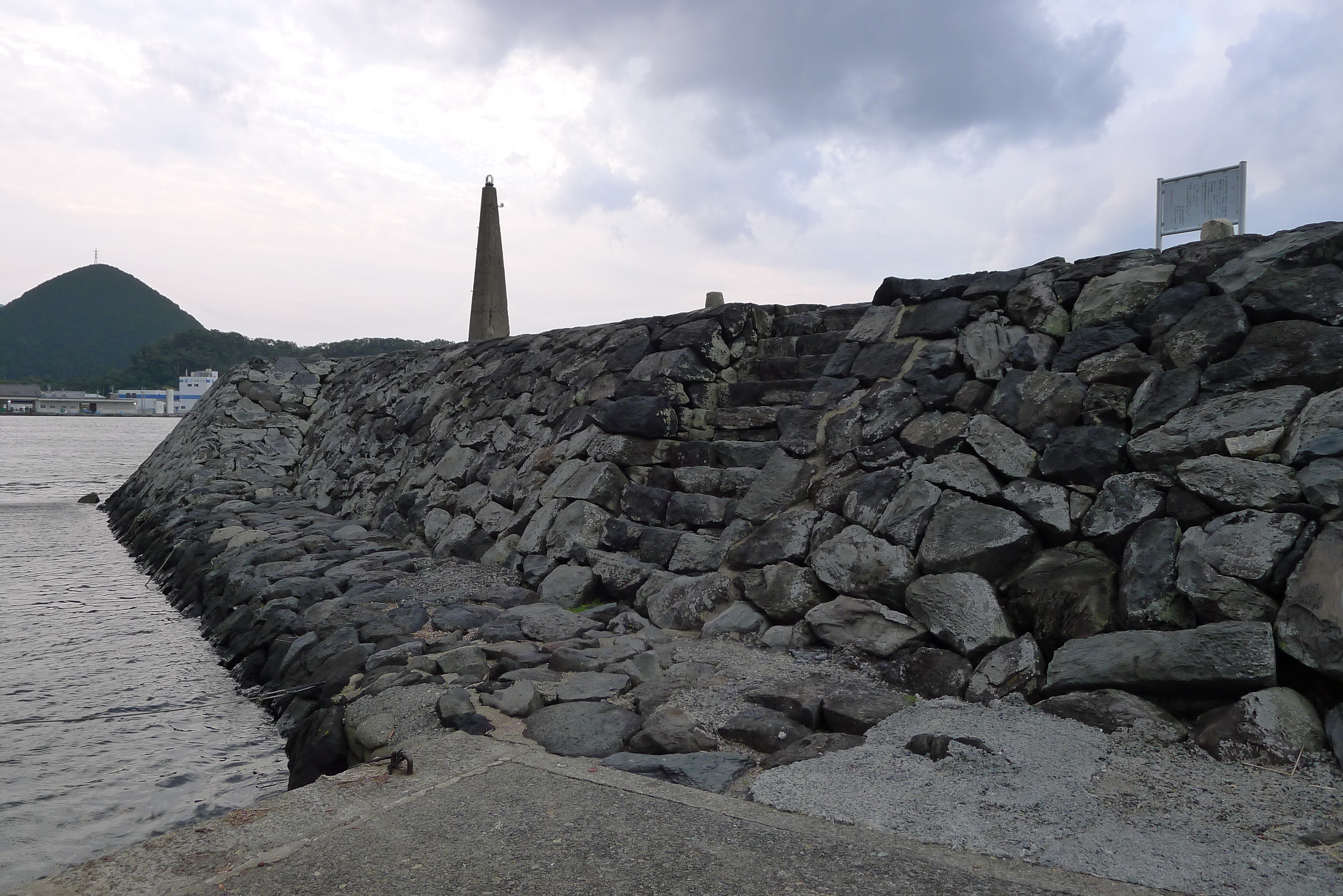 世界遺産「明治日本の産業革命遺産」の構成資産である恵美須ヶ鼻造船所跡(今浦波戸)